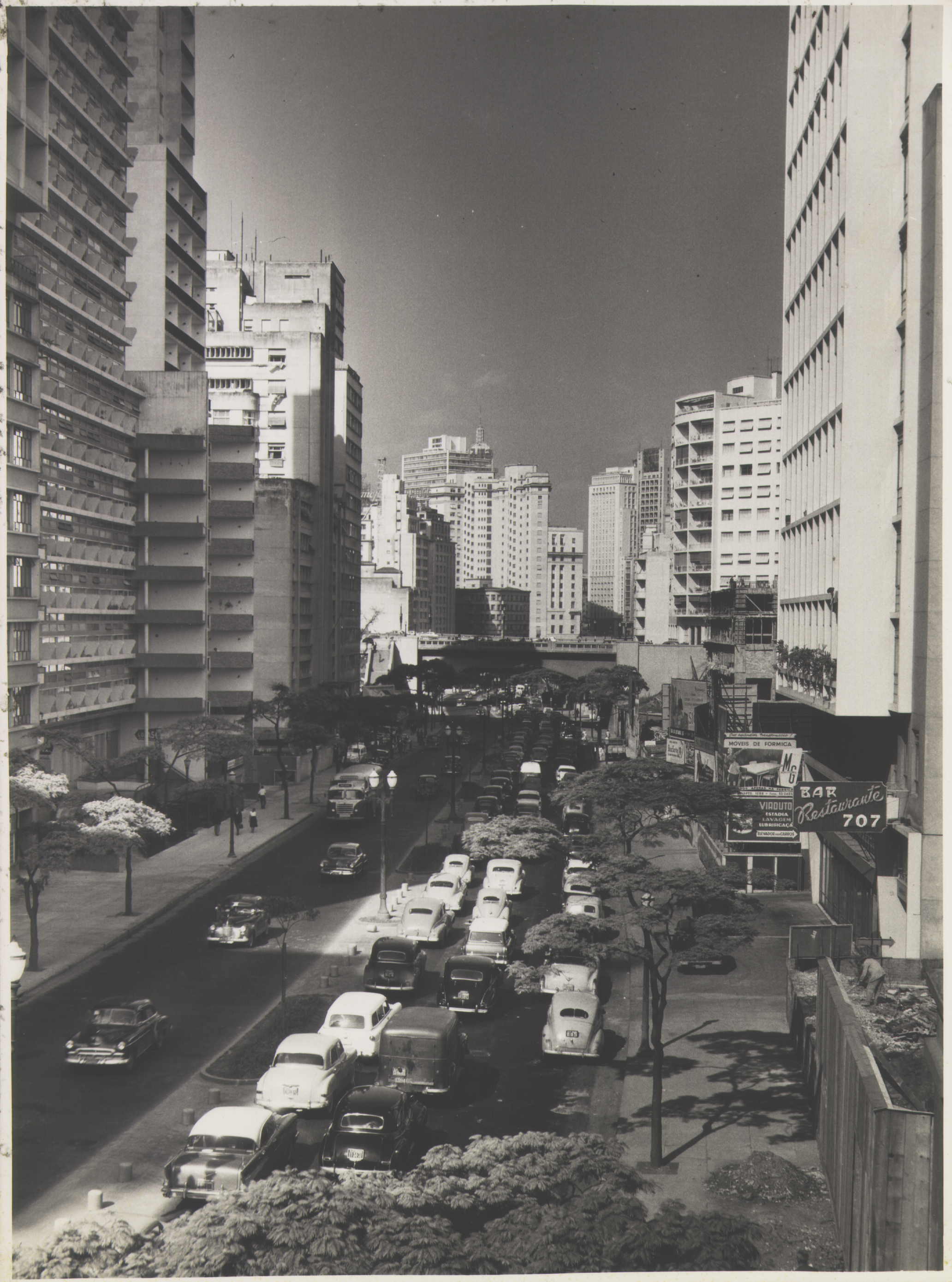 Obra que integra o acervo do Museu Paulista da USP. Coleção Werner Haberkorn